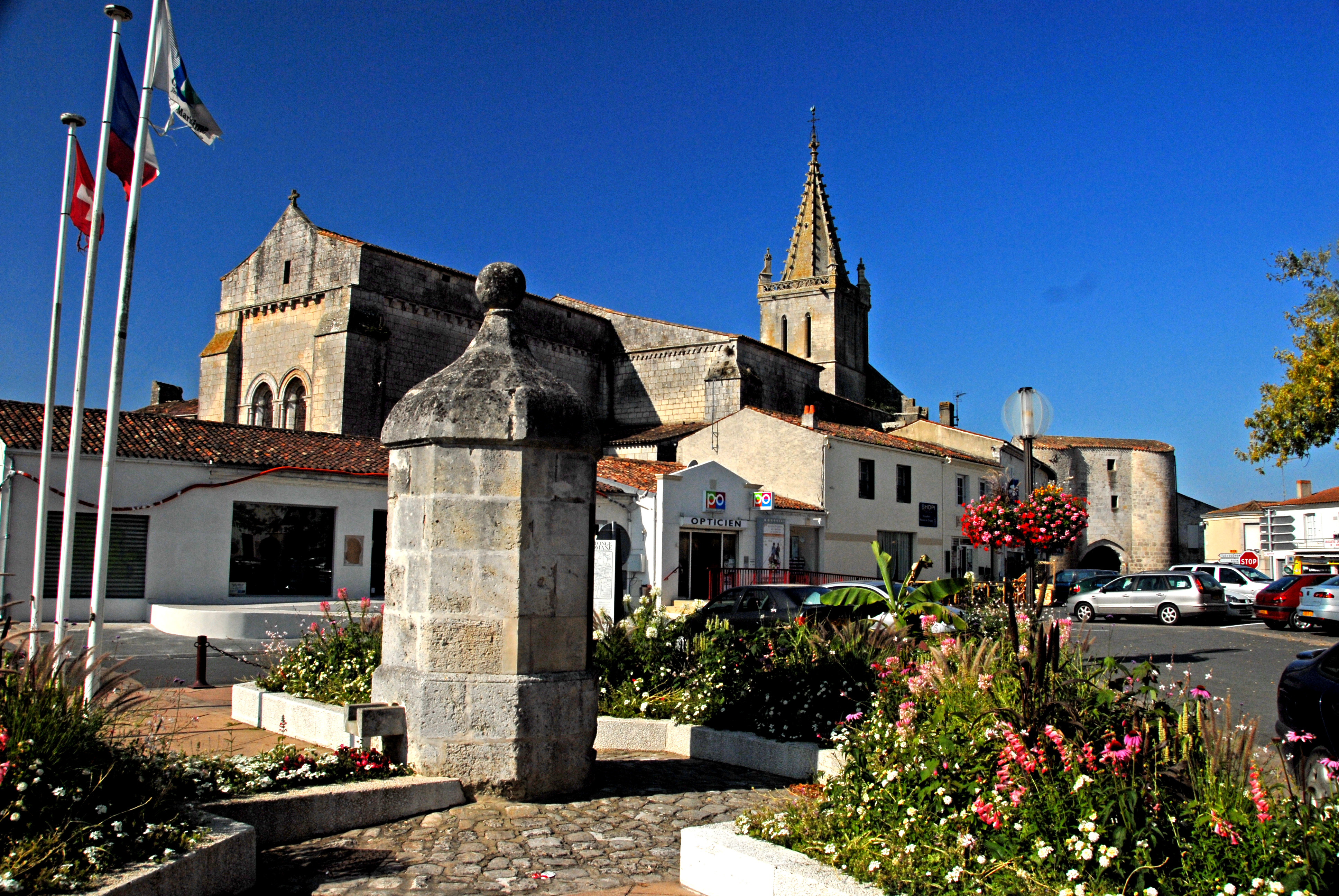 Pont-l'Abbé-d'Arnoult, Kirche, Église de Saint-Pierre de Pont-l'Abbé-d'Arnoult, und ein Stadttor von N-O. Das ehemalige, heute noch wehrhaft wirkend Stadttor besteht aus zwei massiven Rundtürmen ohne außenseitige Fenster Das dazwischen befindliche große Portal wird mit einem angespitzten Rundbogen überspannt. Darüber liegt ein Verbindungstrakt.